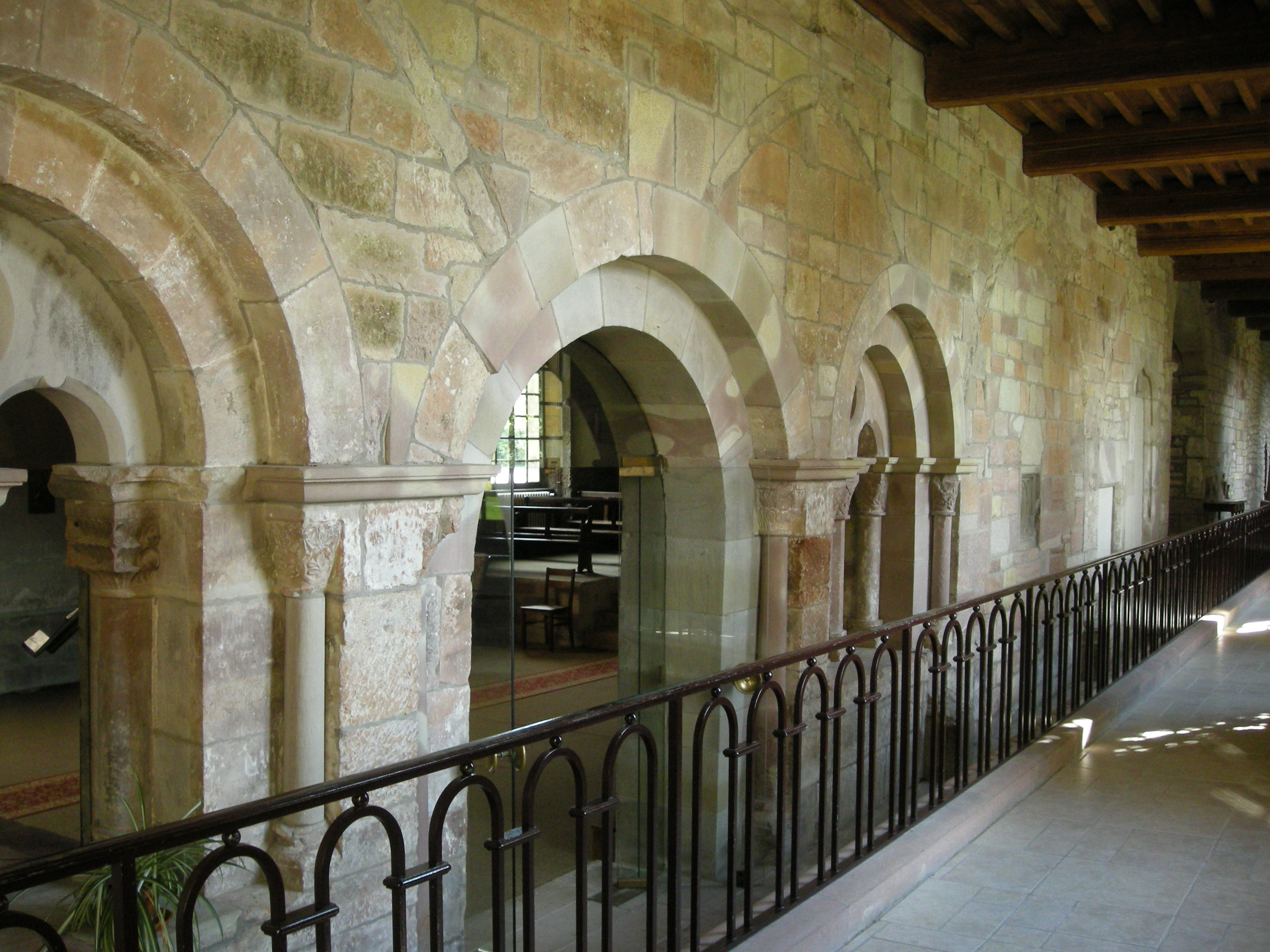 Abbaye Notre-Dame d'Autrey (Vosges) : arcades romanes bordant l'ancien cloître du 15e siècle orienté Nord-Sud : classement par arrêté du 4 novembre 1955